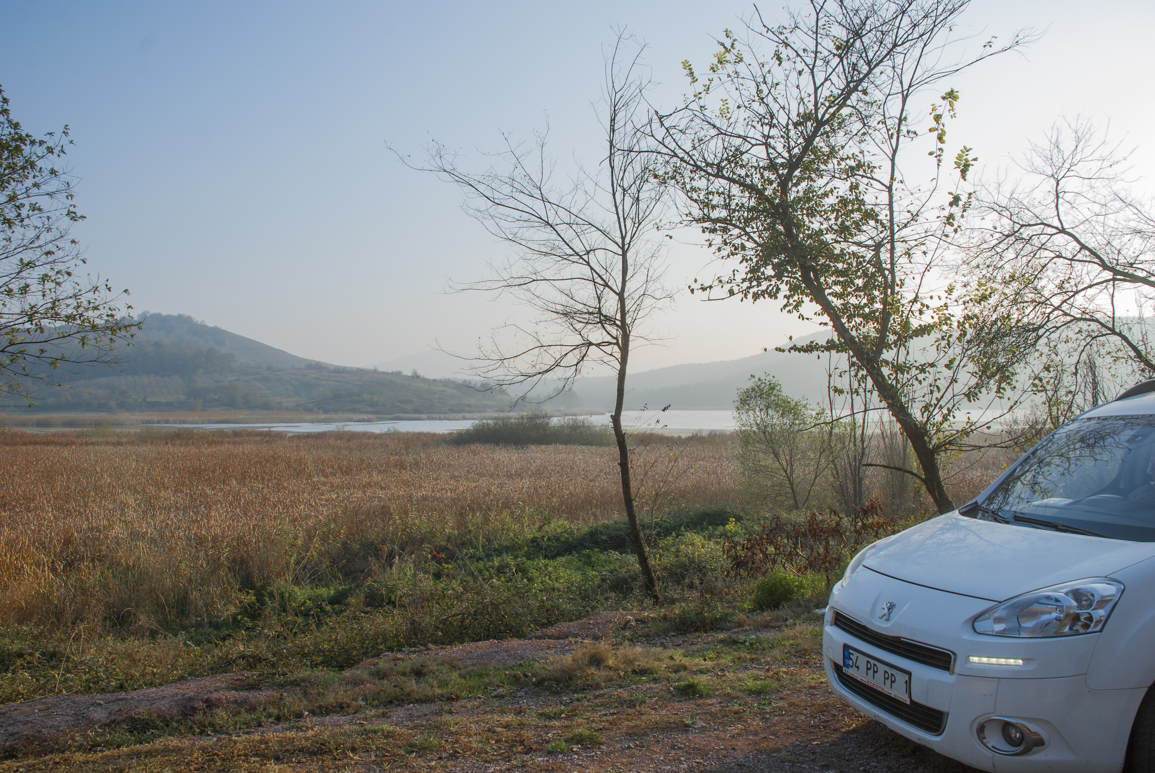 Sakarya, Söğütlü, Küçük Akgöl